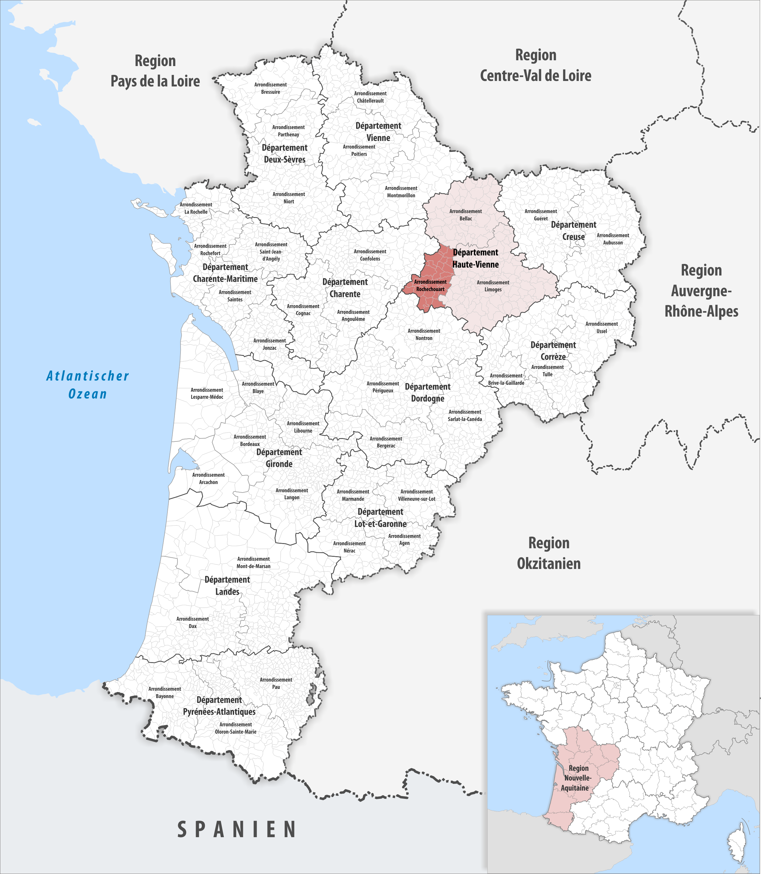 Lage des Arrondissements Rochechouart